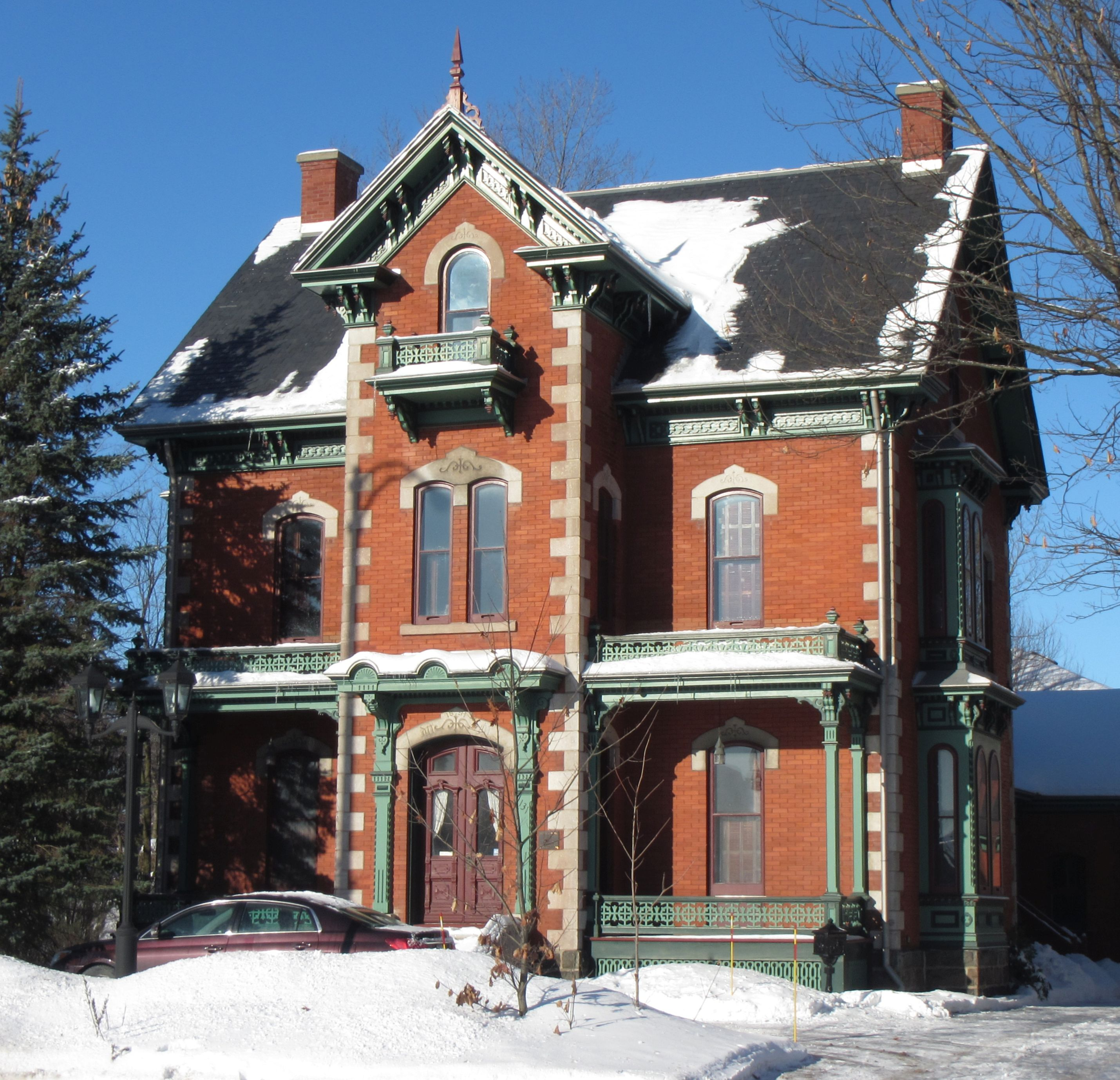 Maison William-Mitchell à Drummondville, Québec.